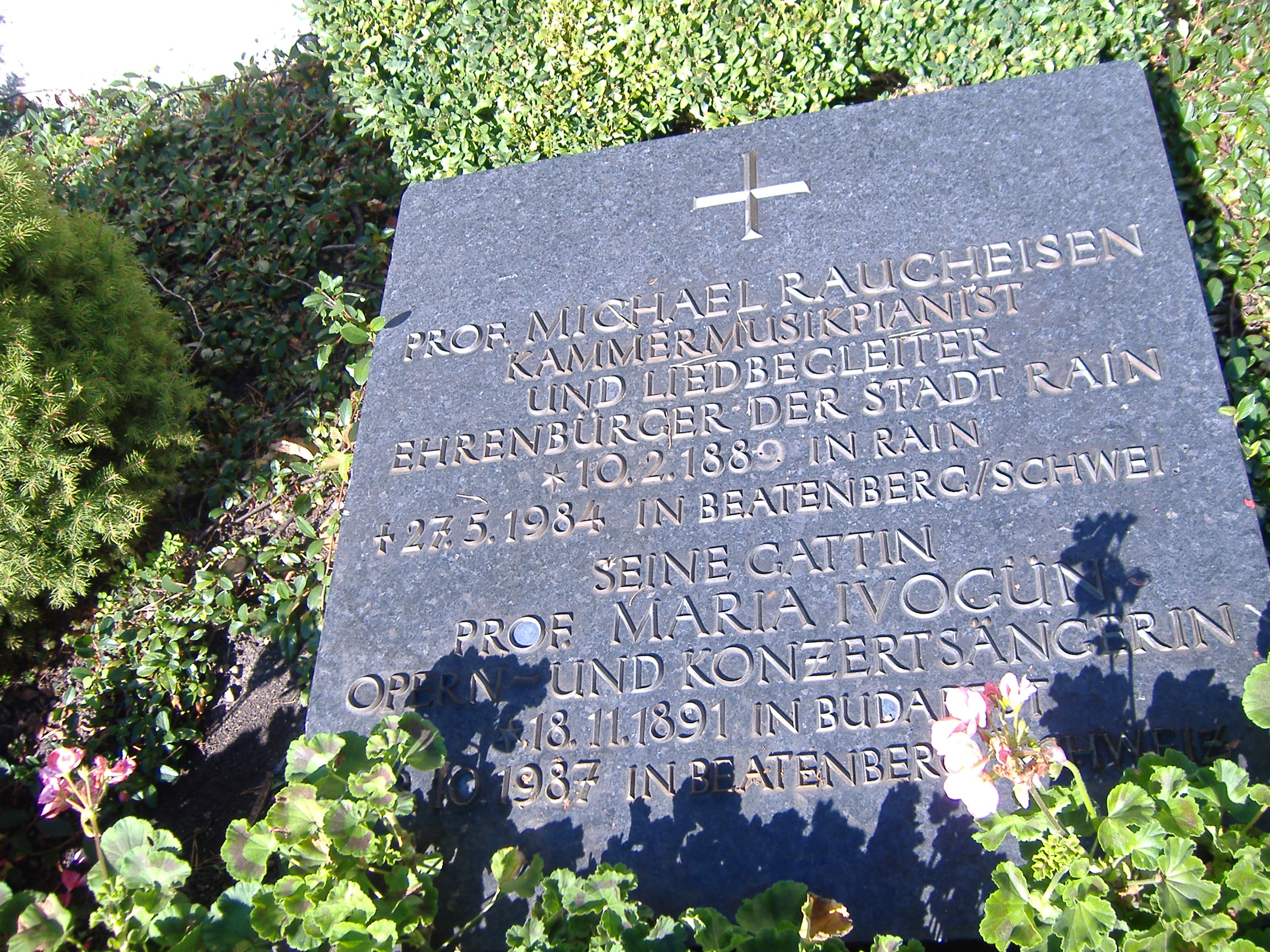 Grabstätte von Maria Ivogün und Mann